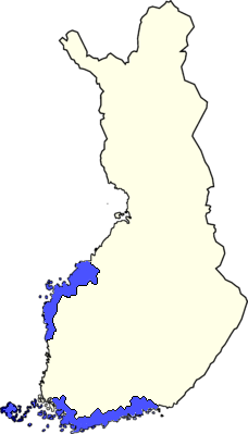 Svenskfinland